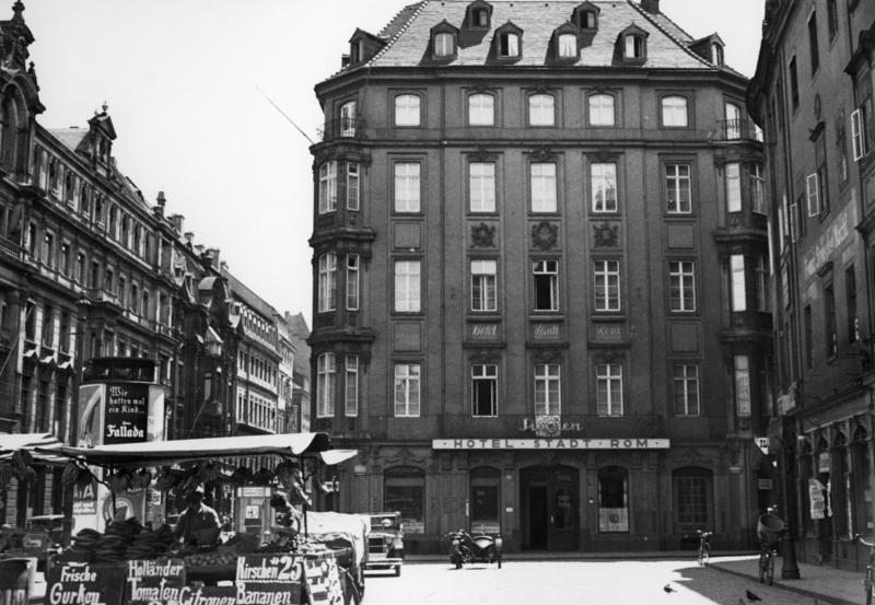 Dresden, Sachsen Neumarkt und Hotel „Stadt Rom“